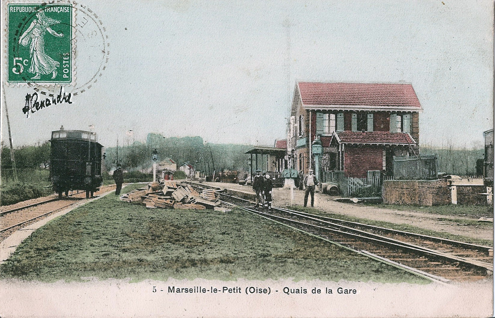 carte postale ancienne éditée par Bréger, N°5 MARSEILLE LE PETIT (aujourd'hui, Marseille-en-Beauvaisis : Quais de la gare